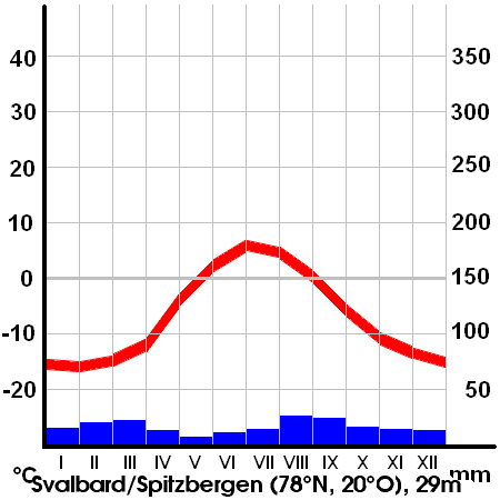 Tundrenklima am Beispiel von Svalbard auf Spitzbergen